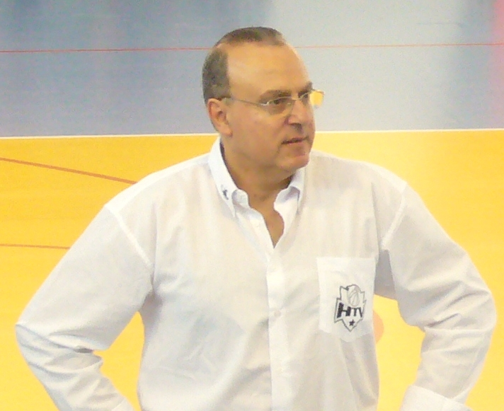 Le joueur puis entraîneur français de basket-ball Alain Weisz (Hyères-Toulon, à Agde, 34)